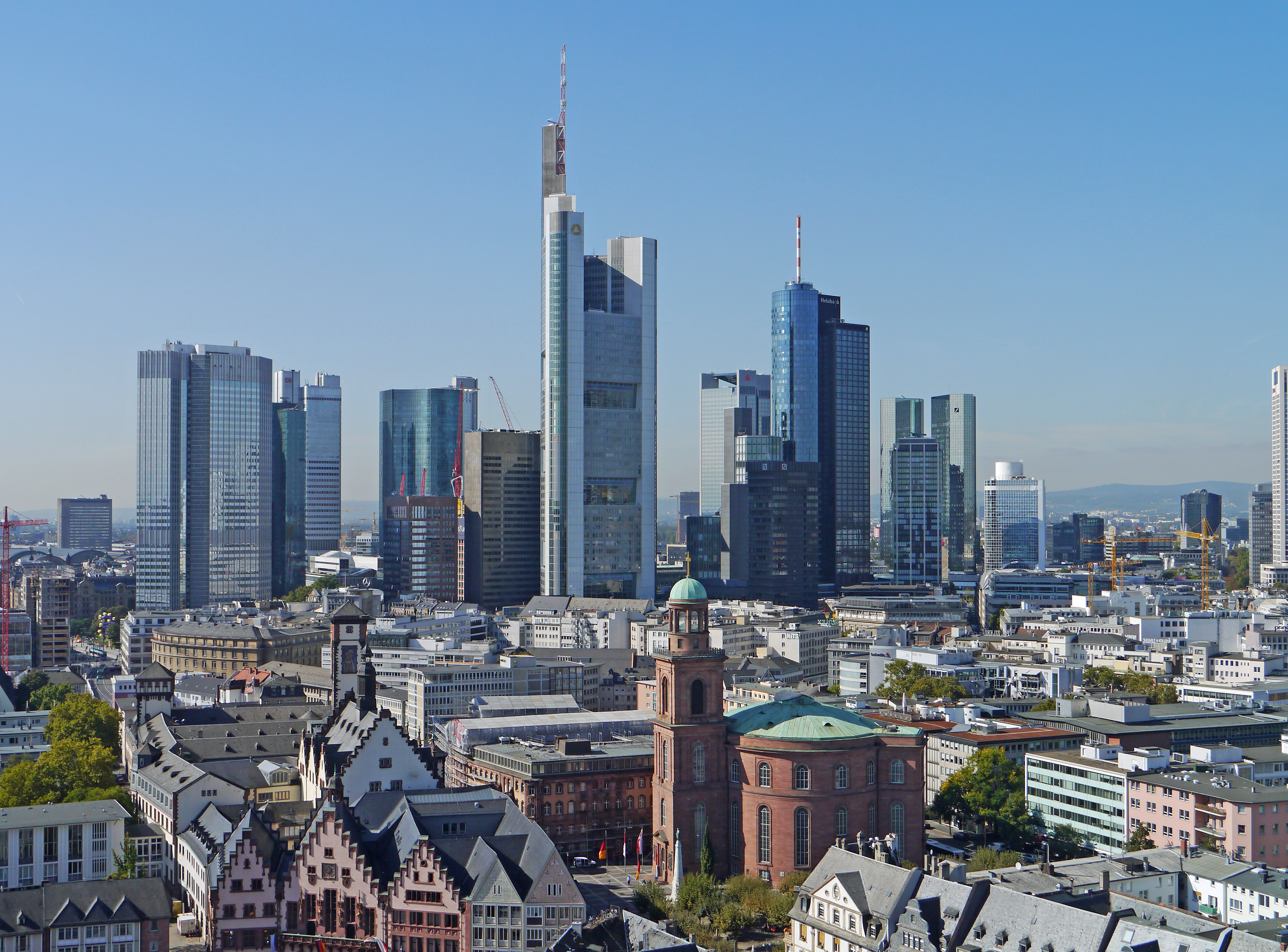 Die Hochhäuser des Bankenviertels. (2012) Blick vom Kaiserdom St. Bartholomäus.